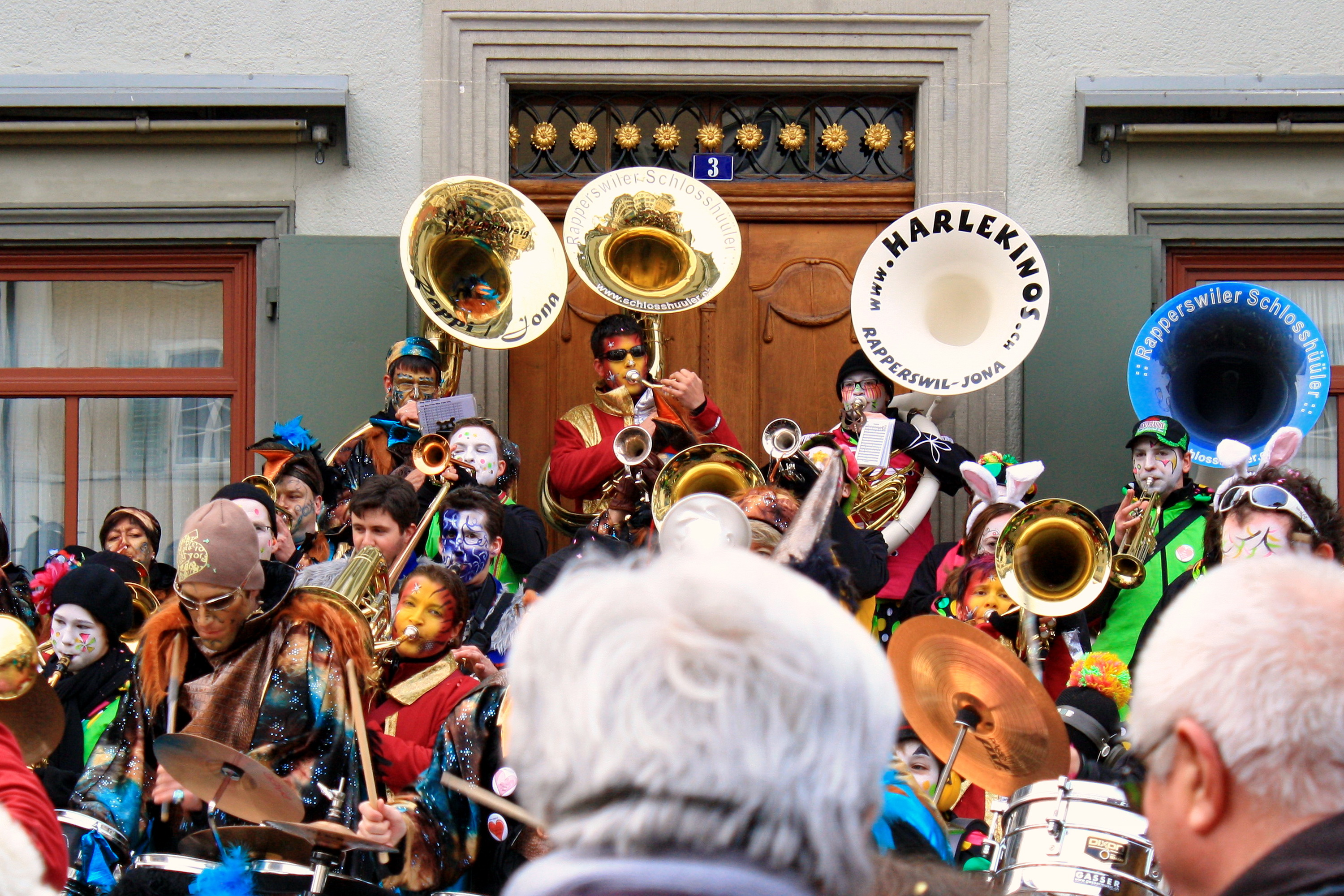 Eis-zwei-Geissebei at Rathaus on Hauptplatz in Rapperswil (Switzerland)